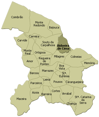 localisation de bidoeira de cima sur la freguesia de leiria